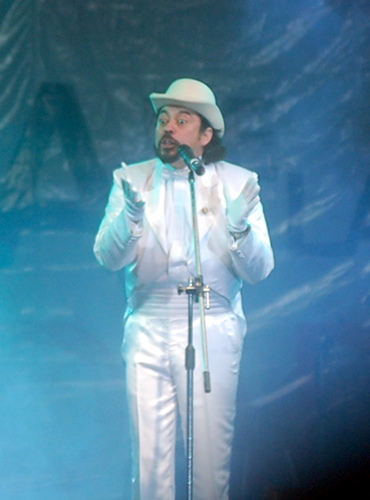 El humorista chileno Bombo Fica.